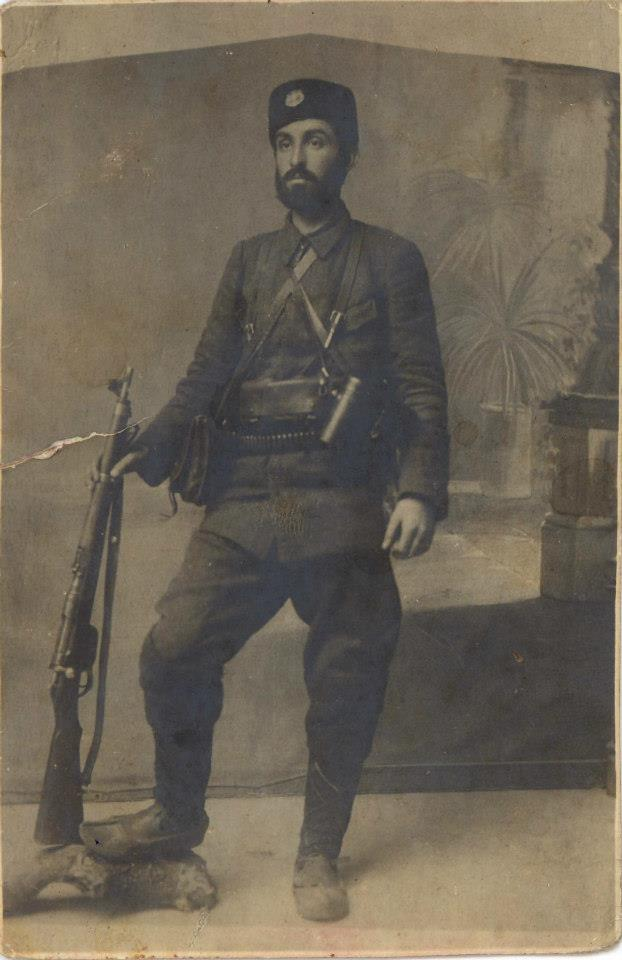 Bulgarian revolutionary Dimitar Lazarov from Radomir